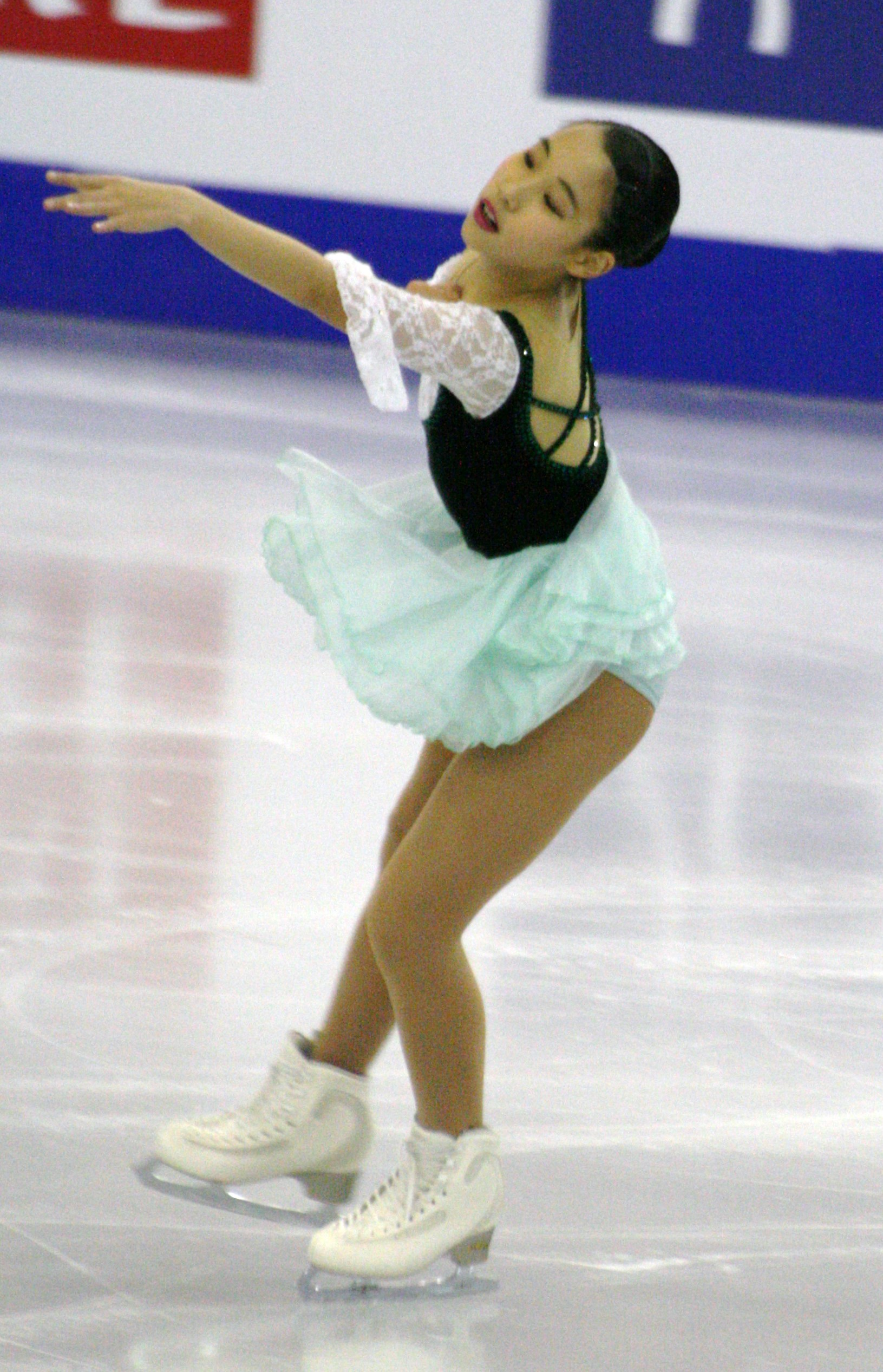 Май Михара (Япония) на финале Гран-при по фигурному катанию среди юниоров 2015-2016.